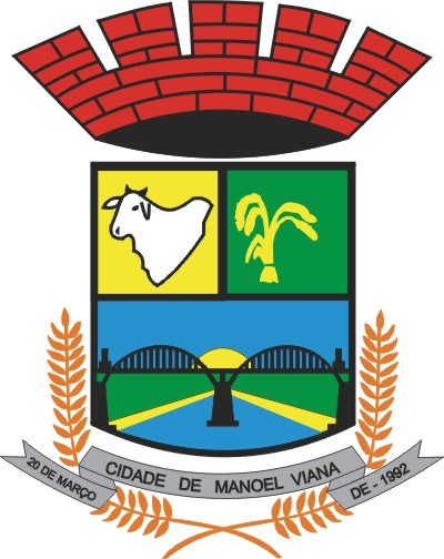 Brasão do município de Manoel Viana, Rio Grande do Sul, Brasil